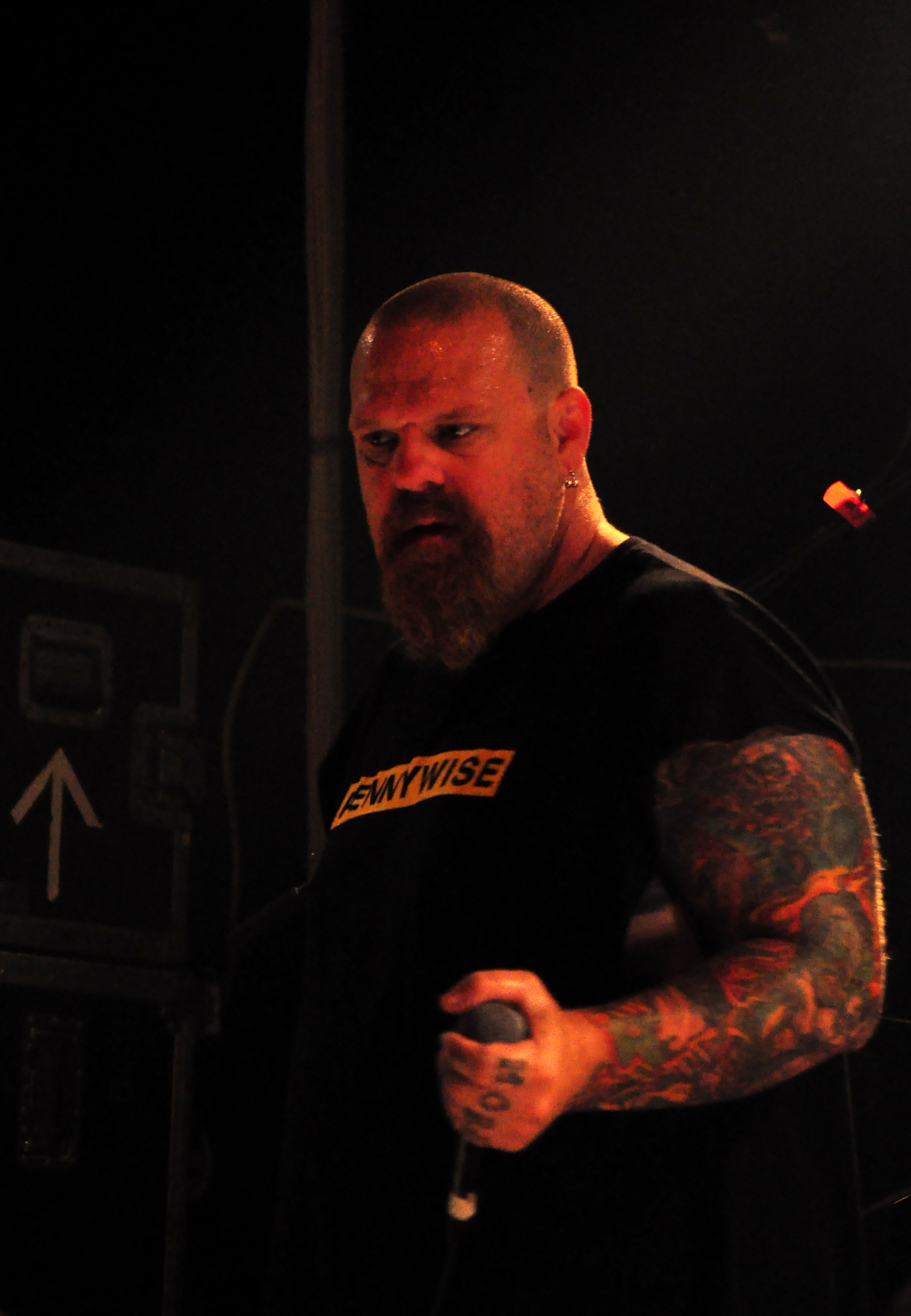 Rob Dukes, Exodus_3